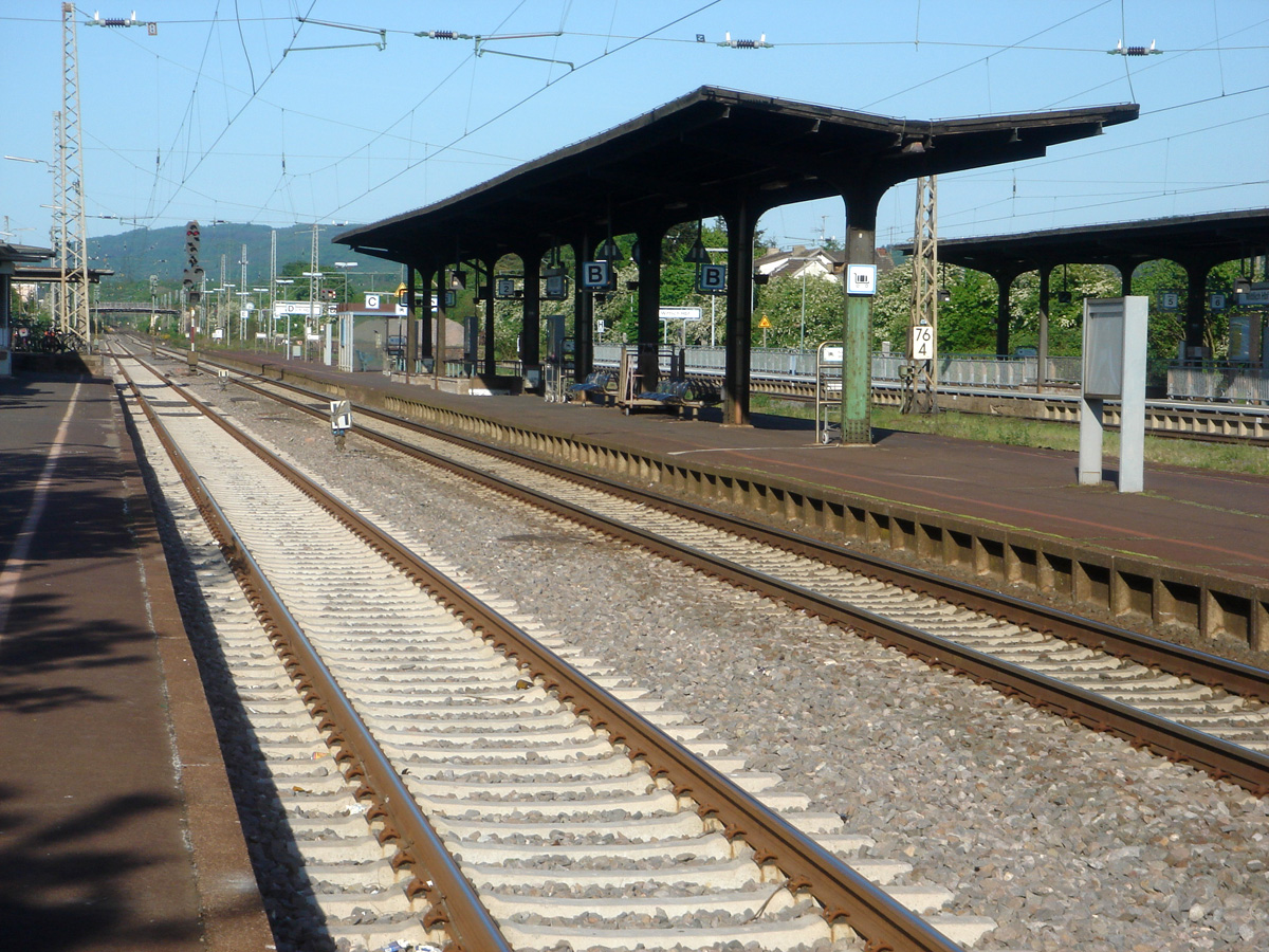 Wittlich Hbf